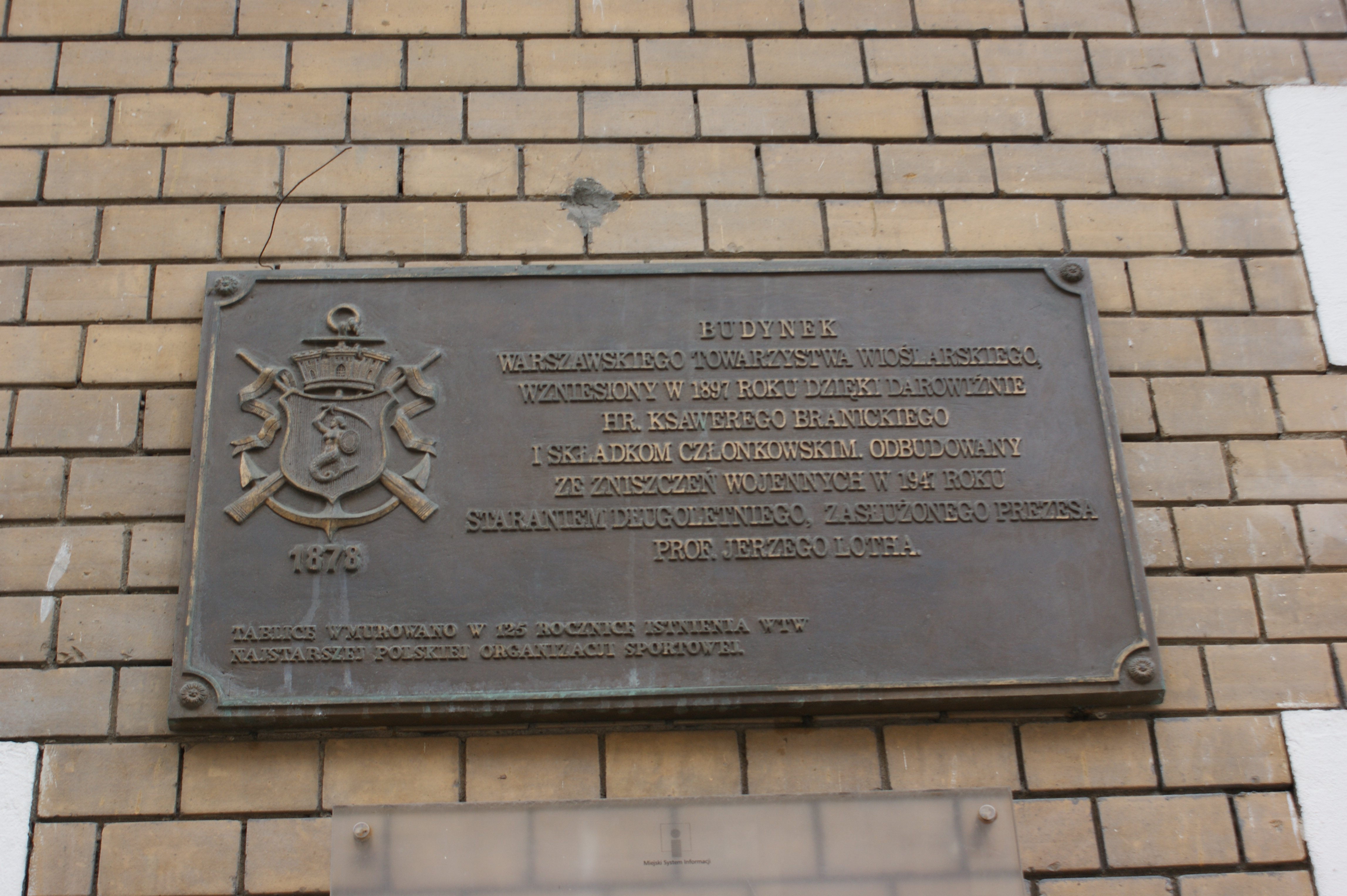 Tablica pamiątkowa gmachu WTW